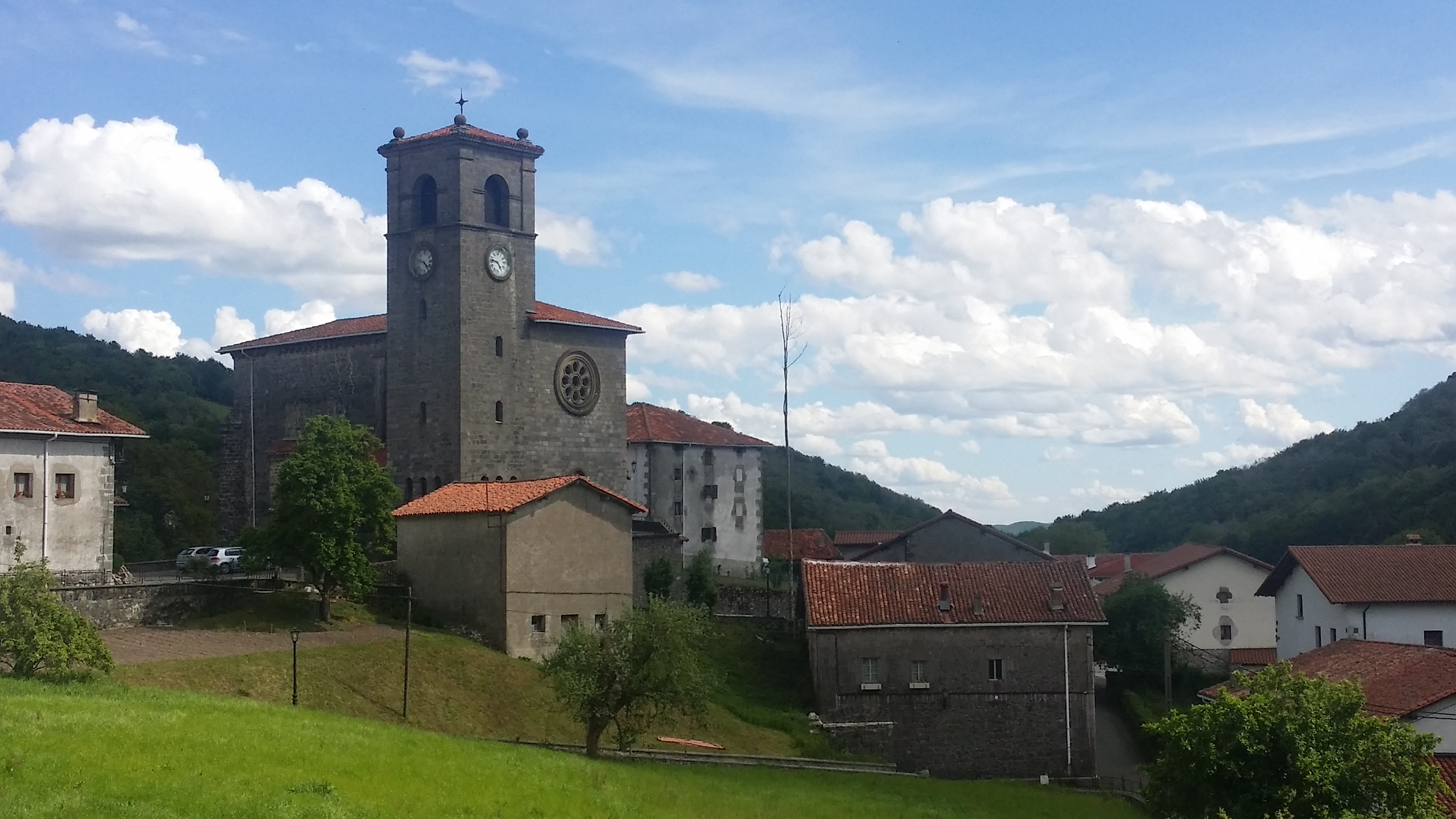 Berueteko eliza